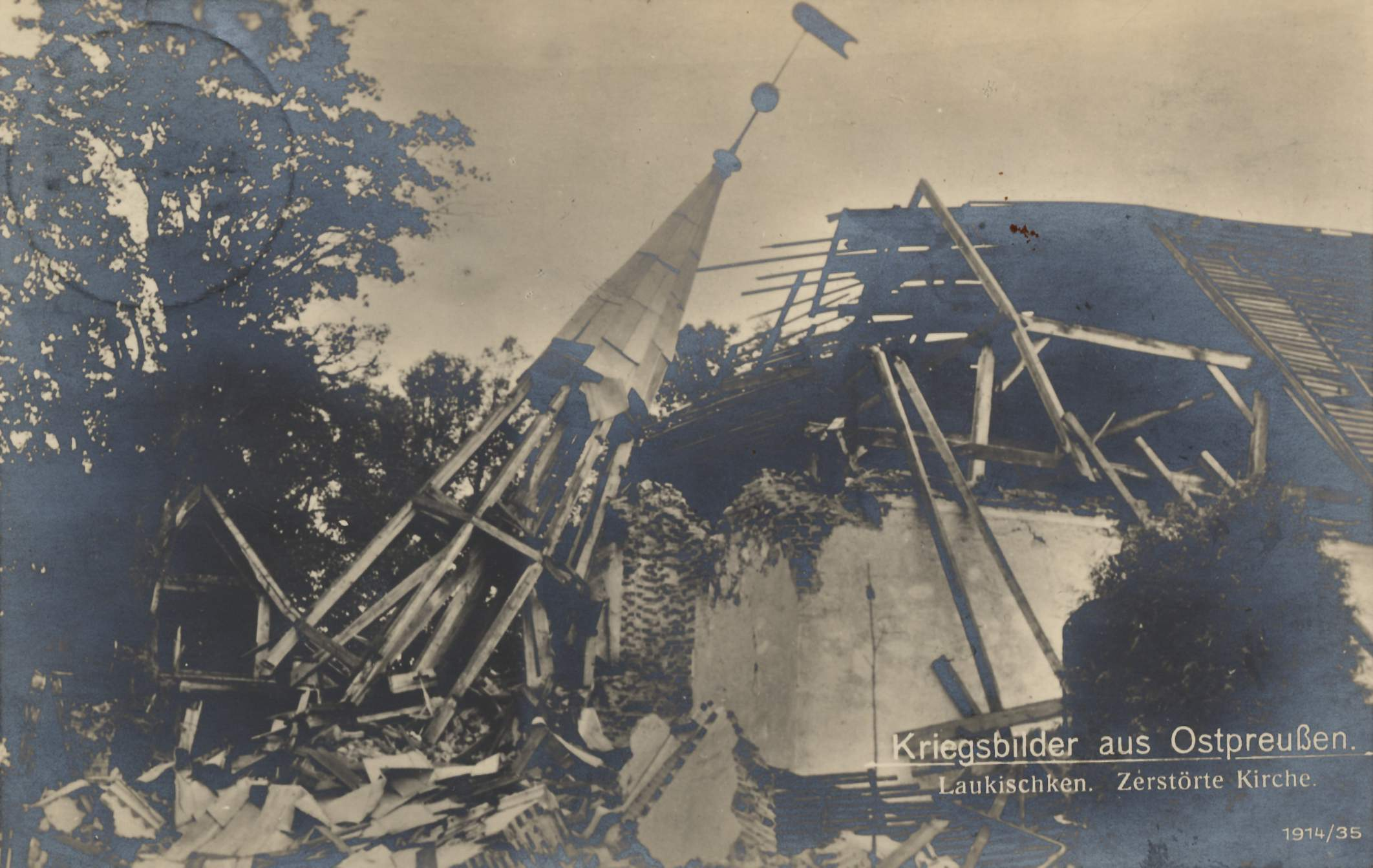 Laukischken, zerstörte Kirche